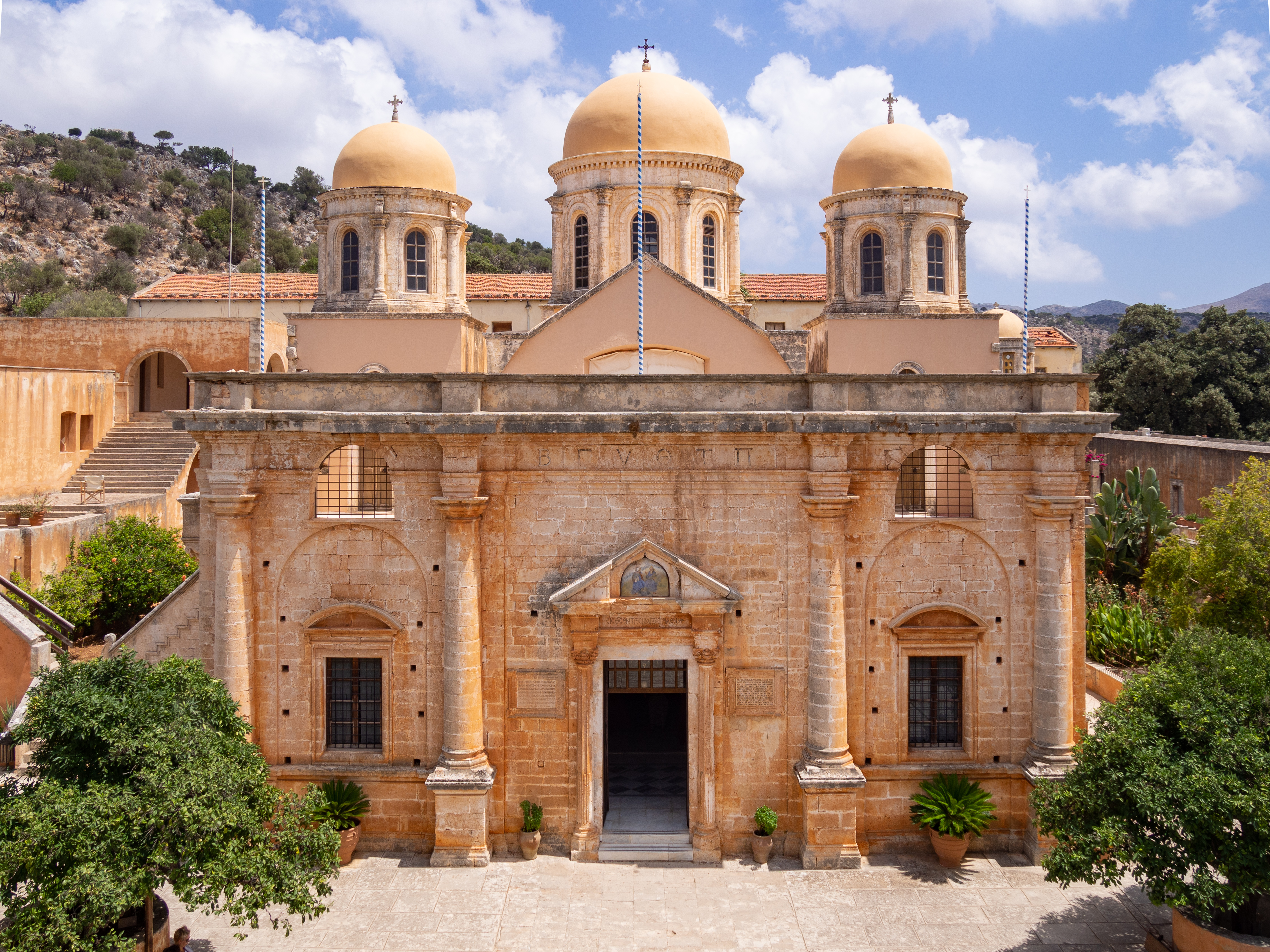 Μονή Αγίας Τριάδας Τζαγκαρόλων«Μονή Αγίας Τριάδας Τζαγκαρόλων»